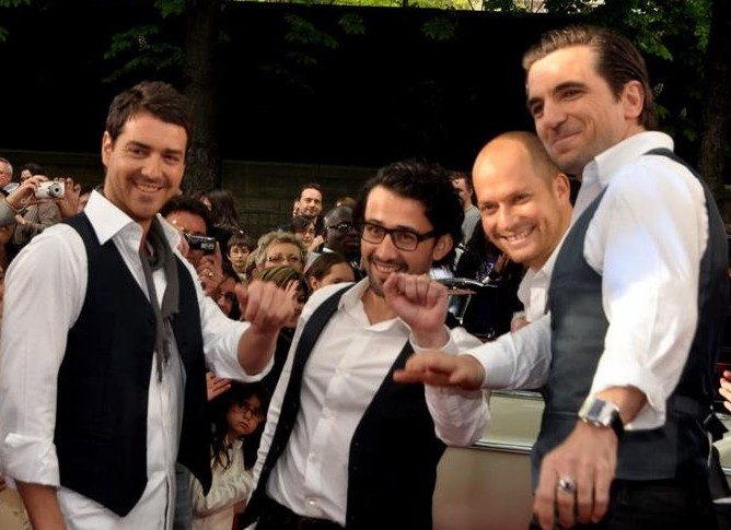 Les Stentors à l'enregistrement de Champs-Elysées. De gauche à droite : Vianney Guyonnet, Mathieu Sempere, Mowgli Laps, Sébastien Lemoine